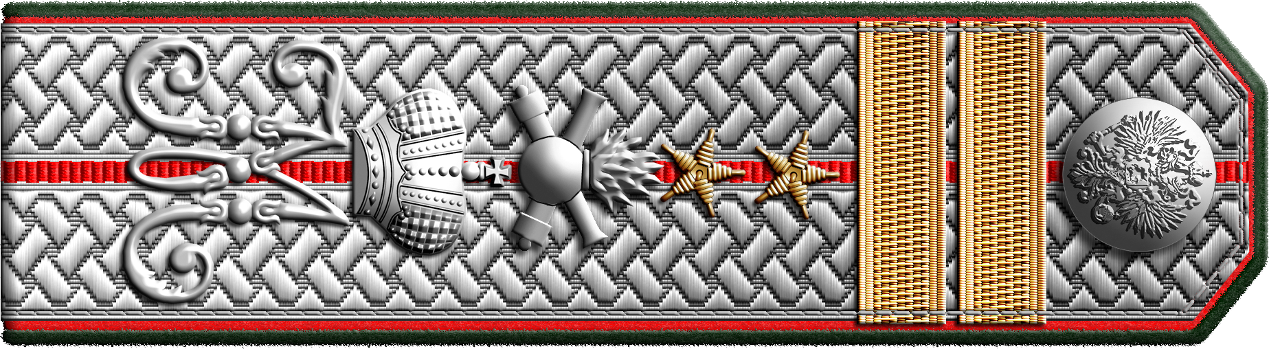 Российская Империя. Российская Императорская армия Род войск/службы: гренадерская артиллерия Знаки различия: погоны образца 1914г. Чин/звание: Зауряд-военный чиновник в чине Губернского секретаря. переименованный из младших унтер-офицеров или равным ему нестроевым, служащий в Кавказской гренадерской Великого князя Михаила Николаевича артиллерийской бригады в должности делопроизводителя по хозяйственной части. Первичные источники: Полное собрание законов Российской империи, собр.3, №14298 от 12 июня 1897 г. Полное собрание законов Российской империи, собр.3, №24680 от 3 июня 1904 г. Полное собрание законов Российской империи, собр.3, №25082 от 29 августа 1904г. Приказ по Военному ведомству №116 от 17 февраля 1914 г.